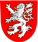 Znak městyse Trhová Kamenice